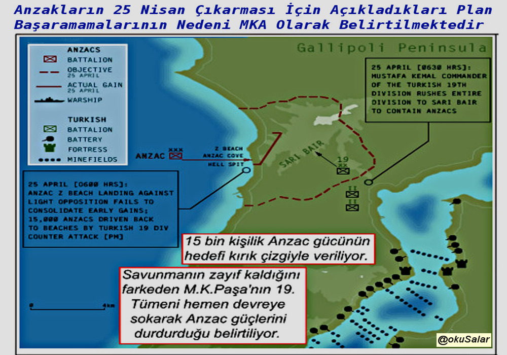 Çanakkale Savaşlarının en önemli olayı çıkarma sabahı Yarbay Mustafa Kemal'in devreye girmesidir. Anzaklar tarafından yayınlanan bu harita ilk günkü işgal hedeflerini ve Yrb. M. Kemal nedeniyle bunu başaramadıklarını anlatıyor.